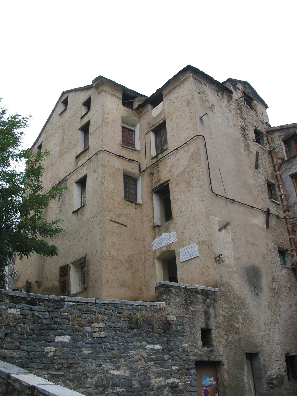 Corte (Haute-Corse, France) - Maison au n°1 de la Place du Poilu (autrefois nommée "Place d'Armes"). Cette maison est le lieu de naissance de Arrighi de Casanova (qui accompagna Bonaparte en Egypte) et de Joseph Bonaparte (qui devint roi de Naples et d'Espagne).